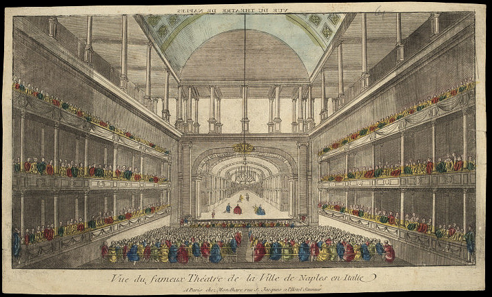 Vue du fameux Théâtre de la Ville de Naples in Italie (Napoli, Italia) Victoria and Albert Museum, London, Museum number: S.6079-2009